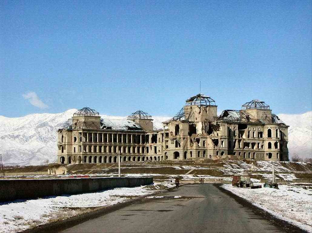 Palais de Darul Aman en Afghanistan.